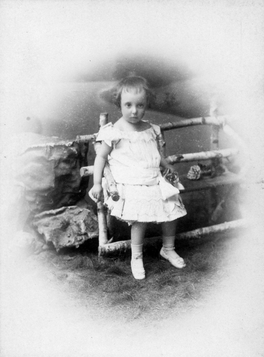 Maria de las Mercedes, Infantin von Spanien, Fürstin von Asturien (1880 - 1904)